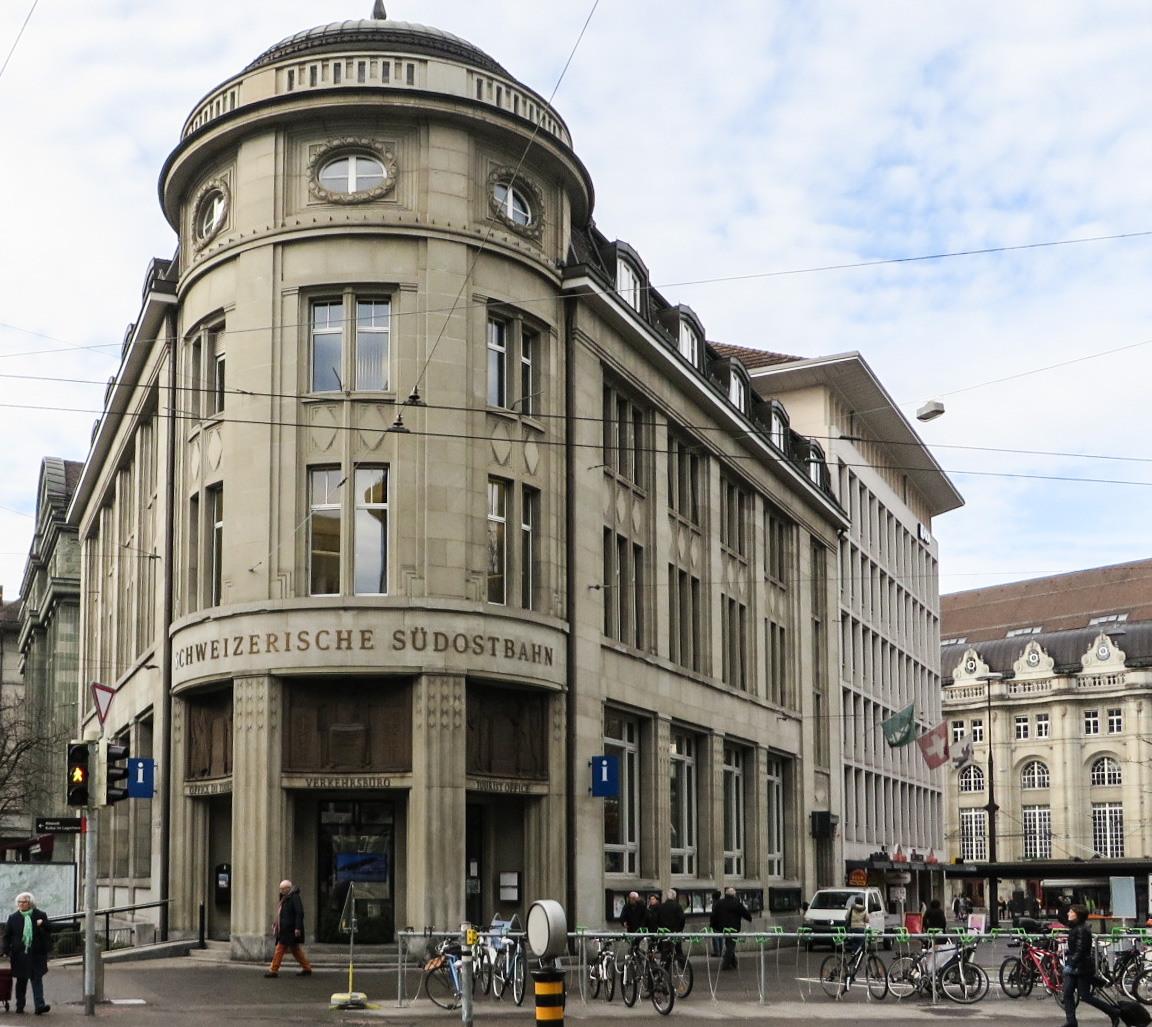 Ursprünglich neu erbaute Niederlassung der Eidgenössichen Bank in St. Gallen, heute Südostbahn + Tourismus St. Gallen/Bodensee